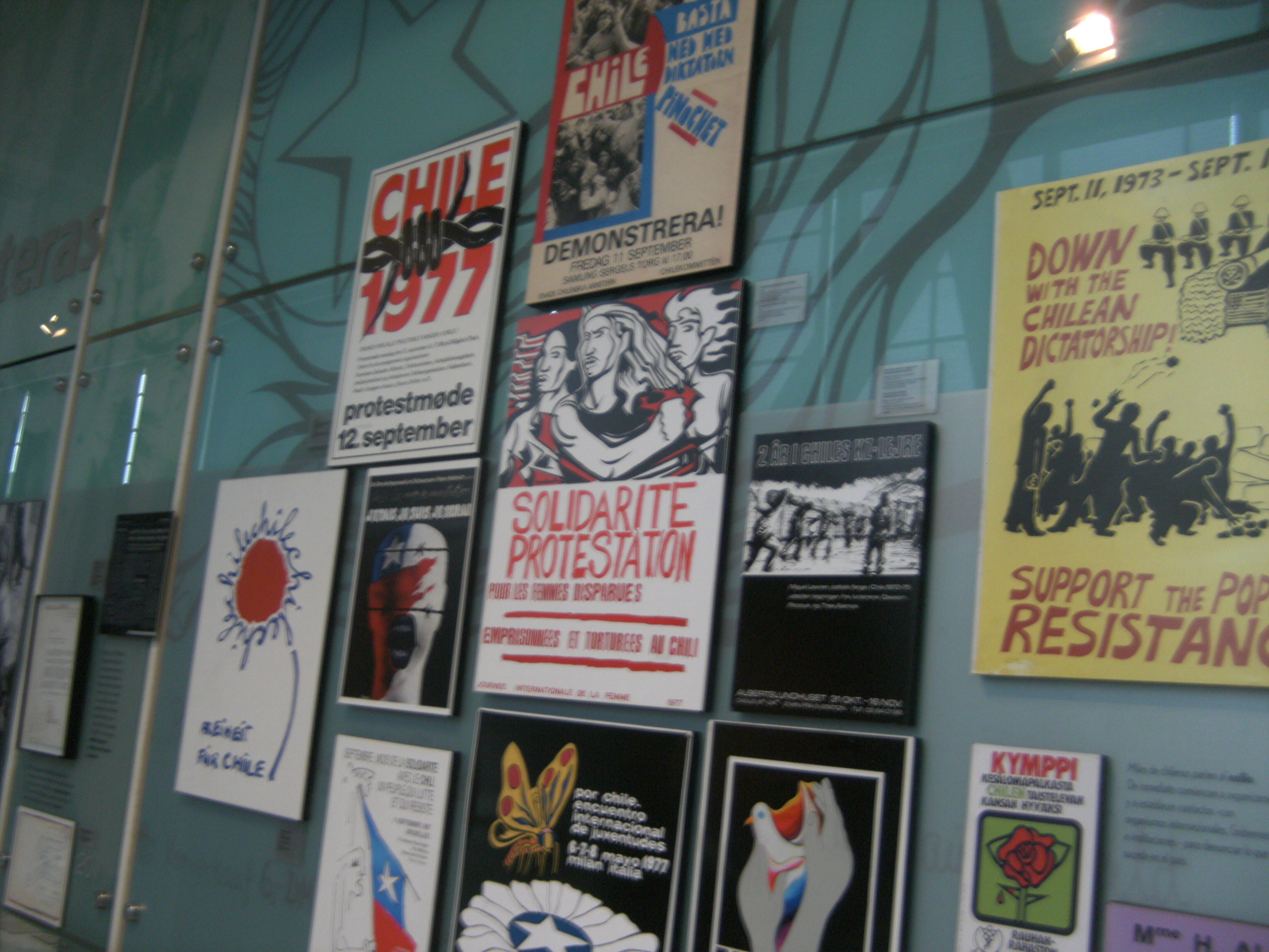 Aspectos del Museo de la Memoria y los derecho Humanos de Chile